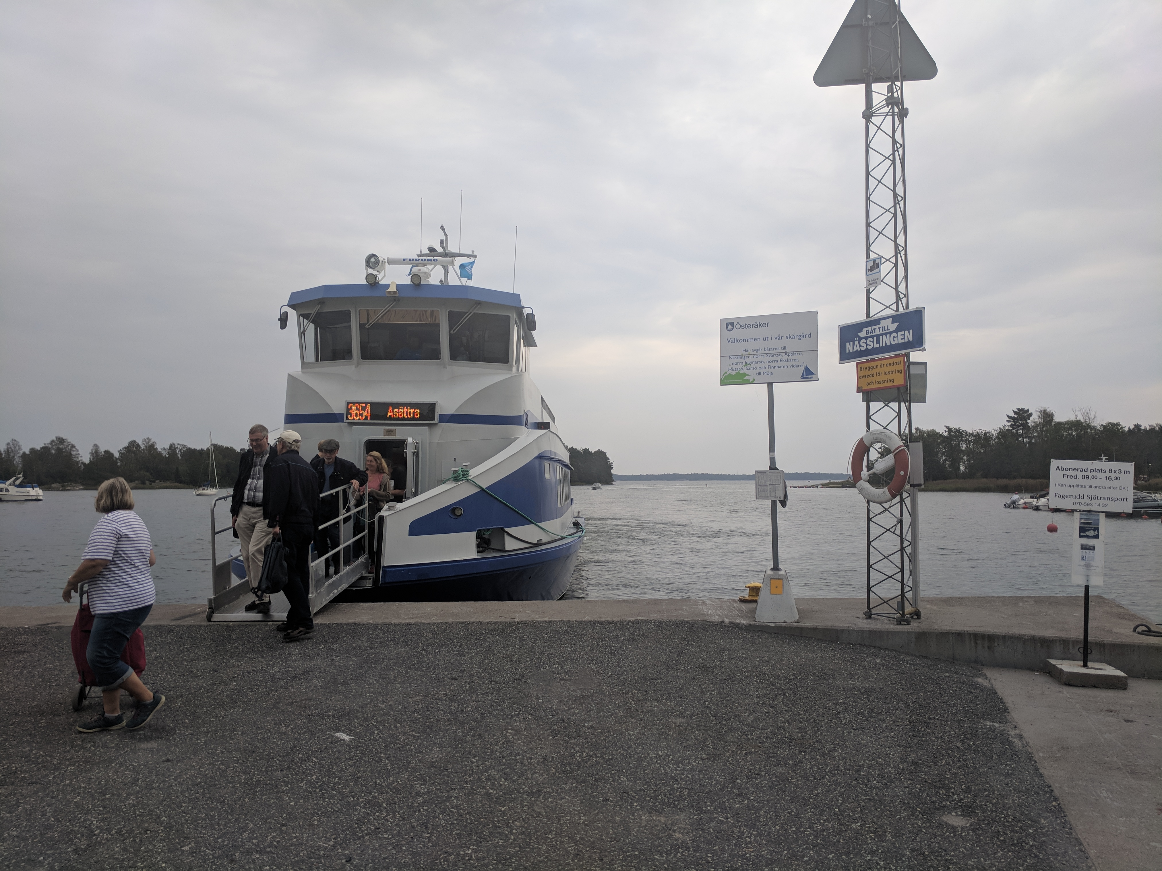 MS Holly